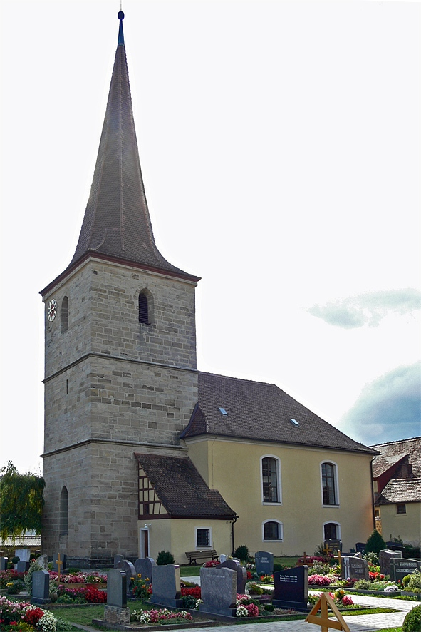 Unternbibert, Gemeinde Rügland, BayernHauptstraße 16, Evang.-Luth. Pfarrkirche St. Bartholomäus, 1491 / 1777This is a photograph of an architectural monument.